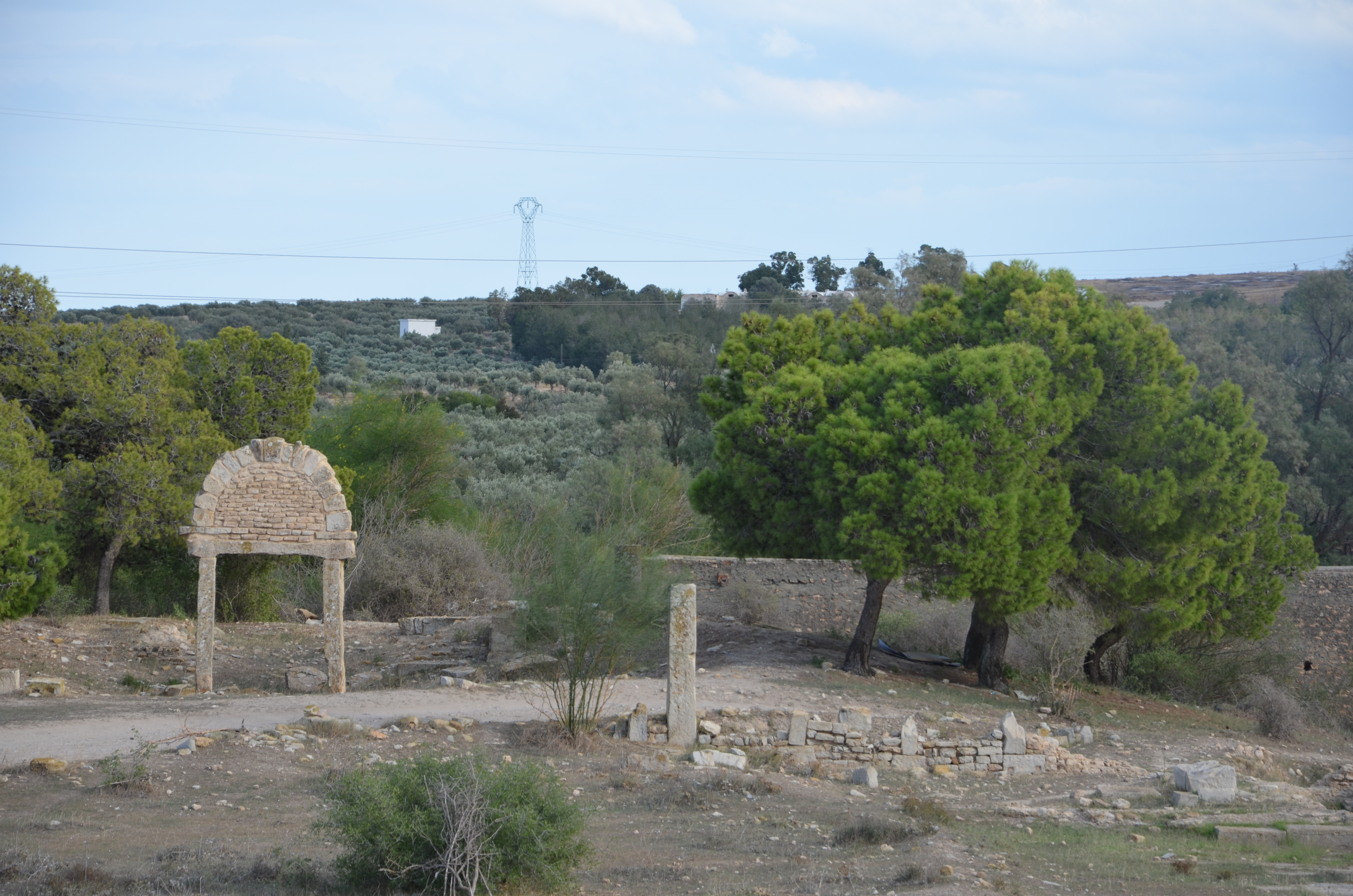 Autre église dont il existe l'abside